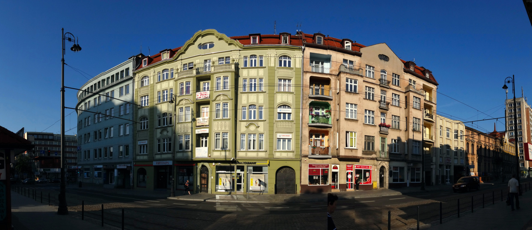 Ulica Dworcowa w Bydgoszczy